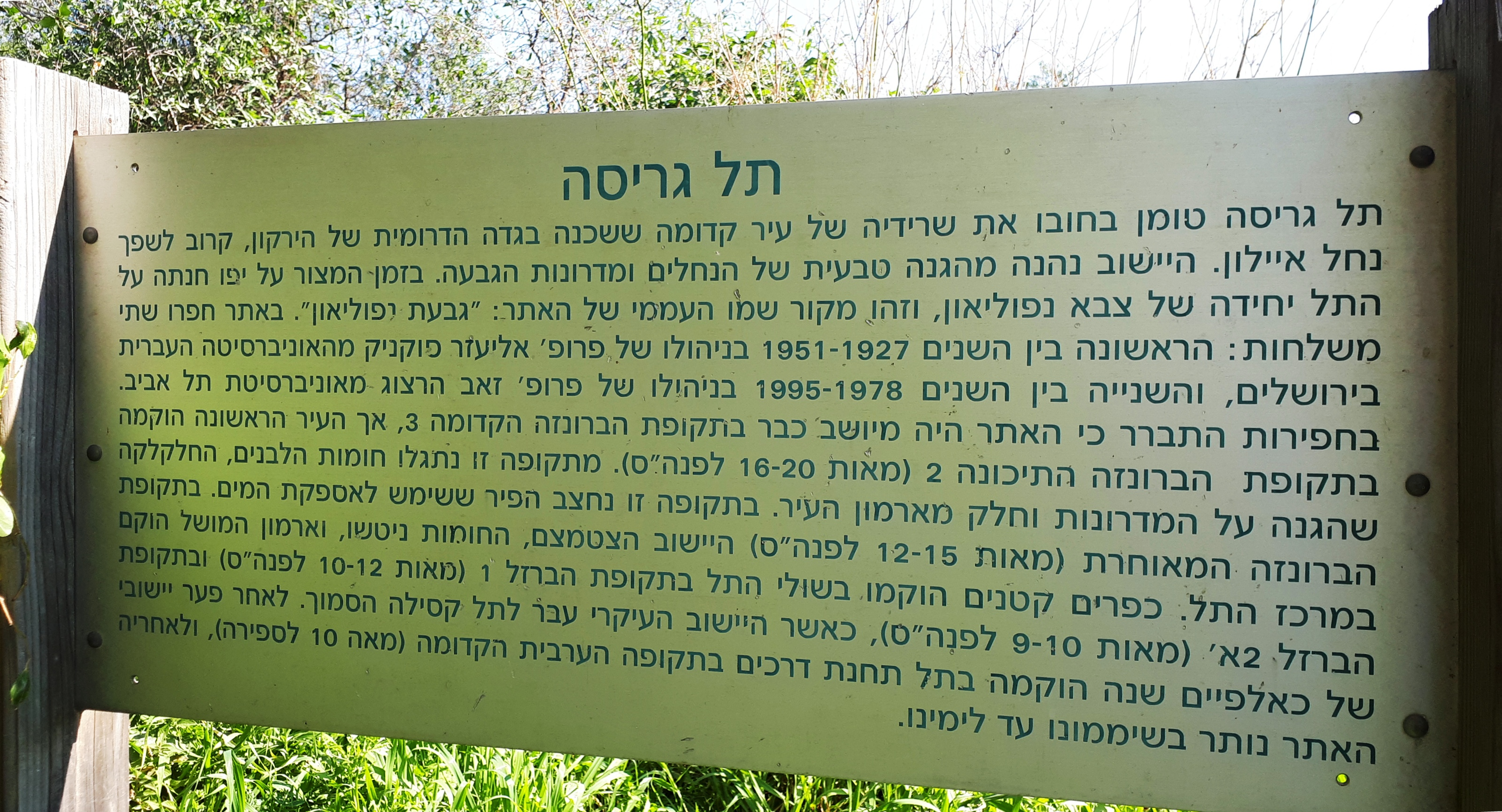 שלט הסבר למרגלות התל